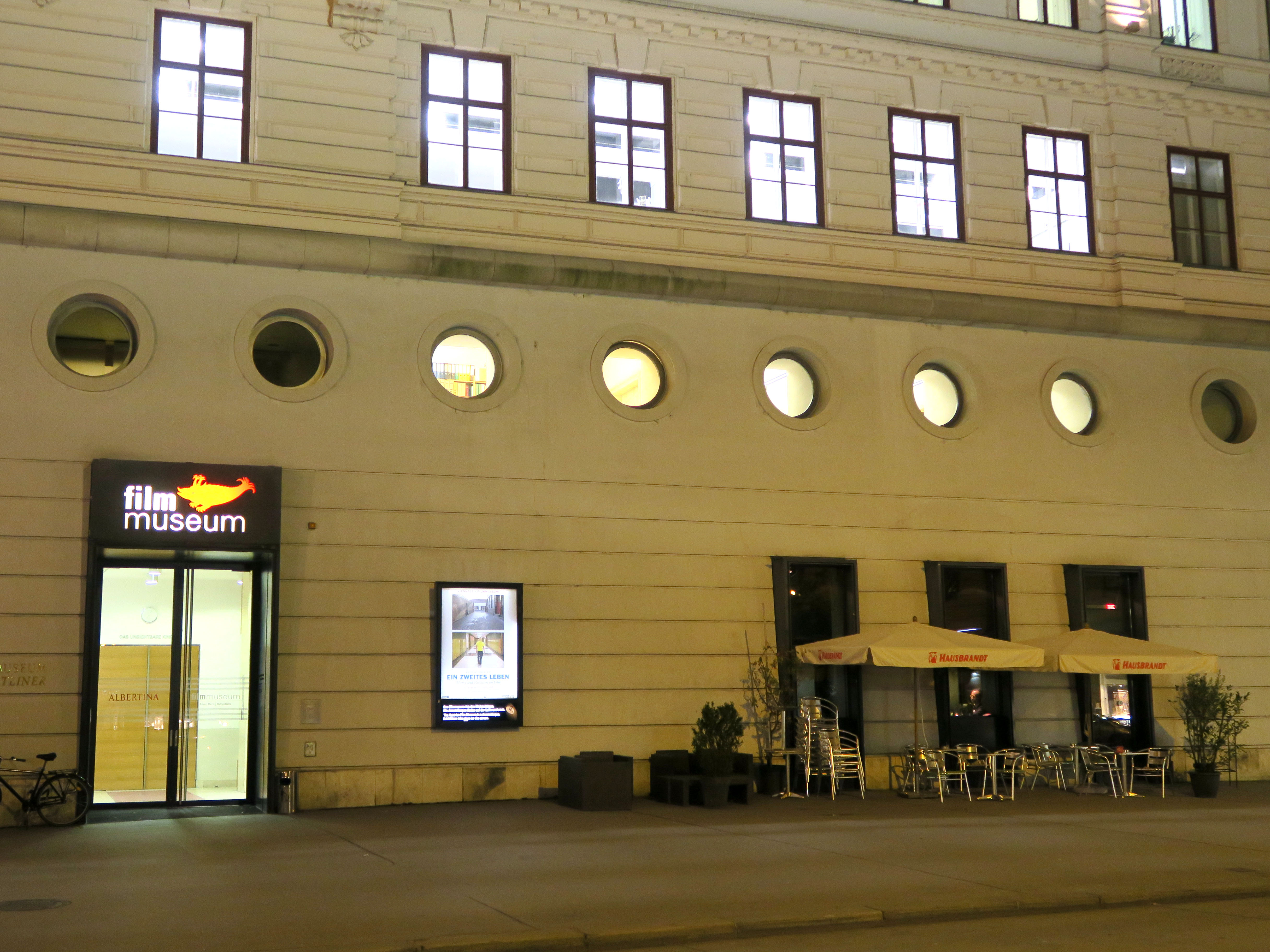 Museumsgebäude von aussen, mit Cafeteria unten rechts und 1. Stock Büros des Museums